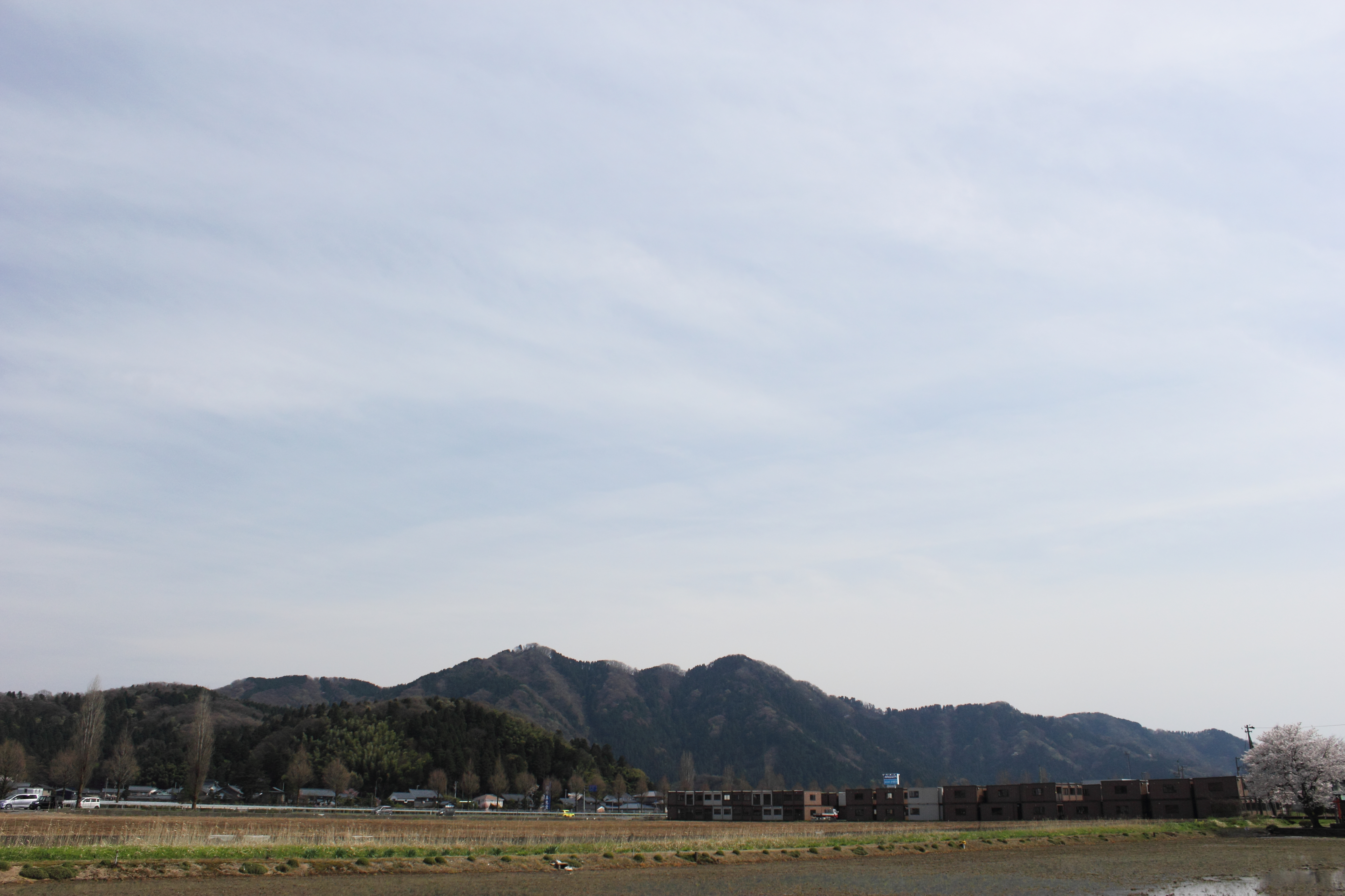 文殊山（福井県）